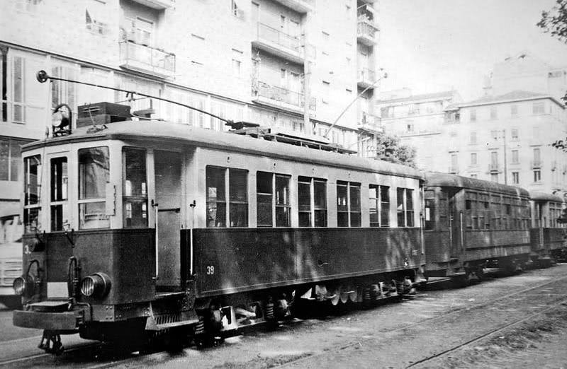 Capolinea in corso Sempione a Milano della tranvia Milano-Gallarate nel 1960